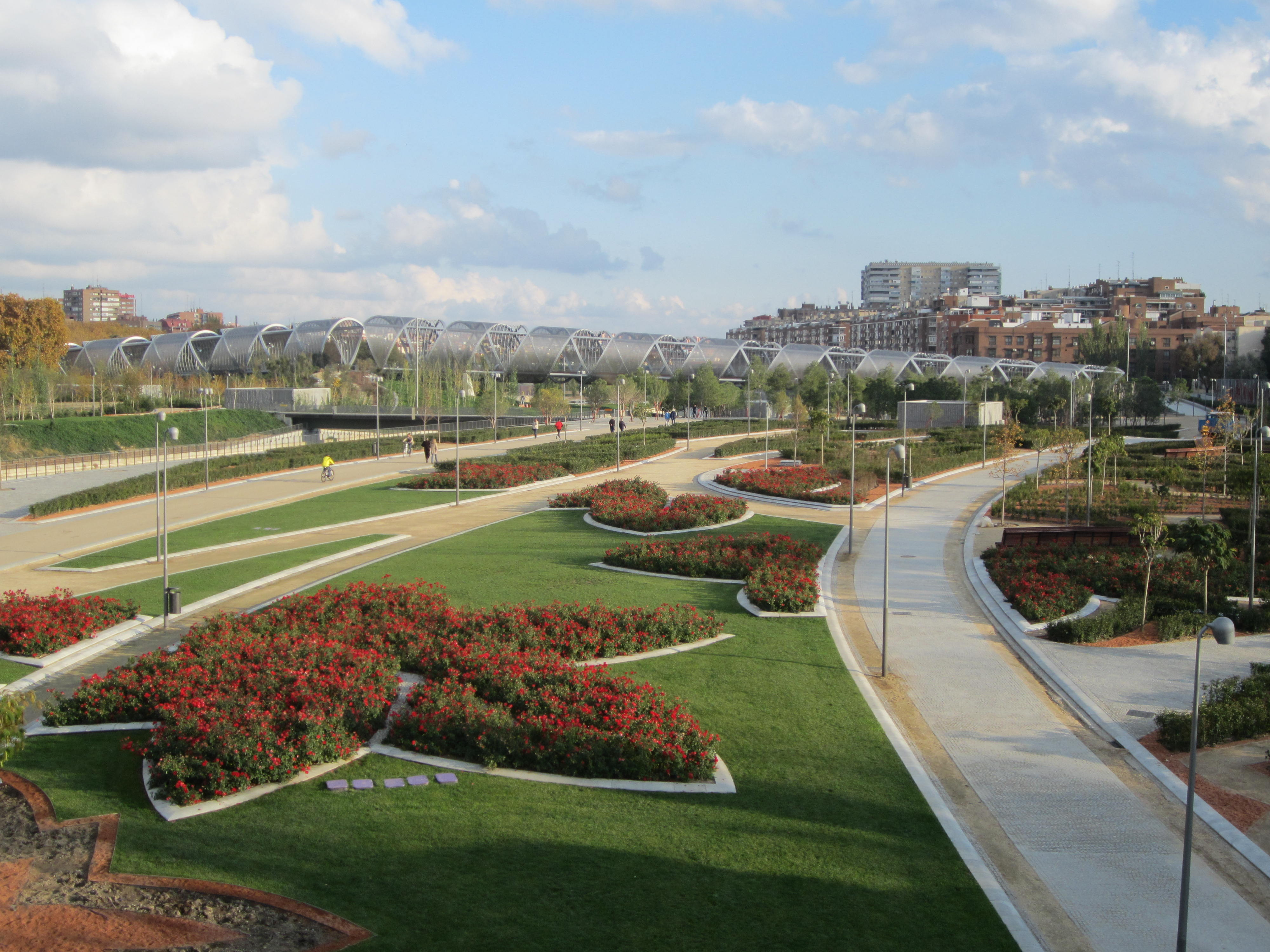 Vista de Madrid Río